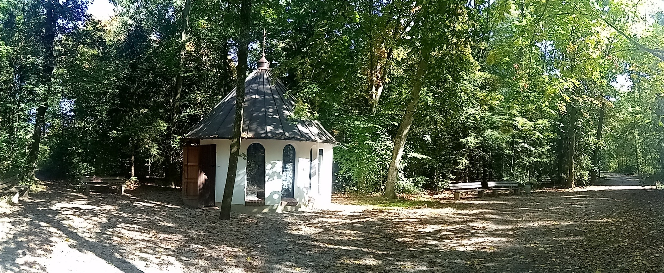 Panorama-Ansicht der Elisabethkapelle im Schopenhauer Wald in der oberbayerischen Gemeinde Neubiberg.